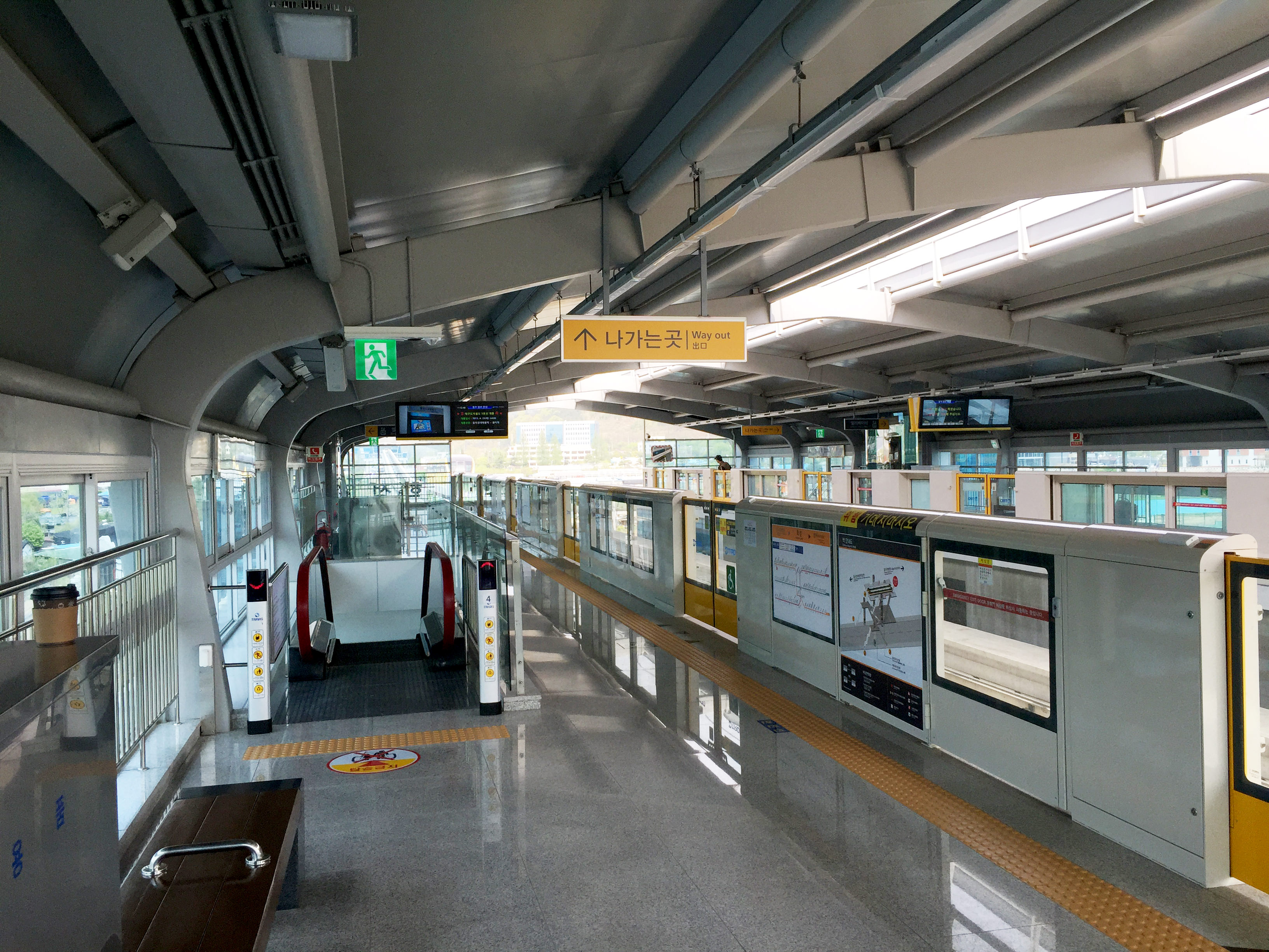 학정역 승강장